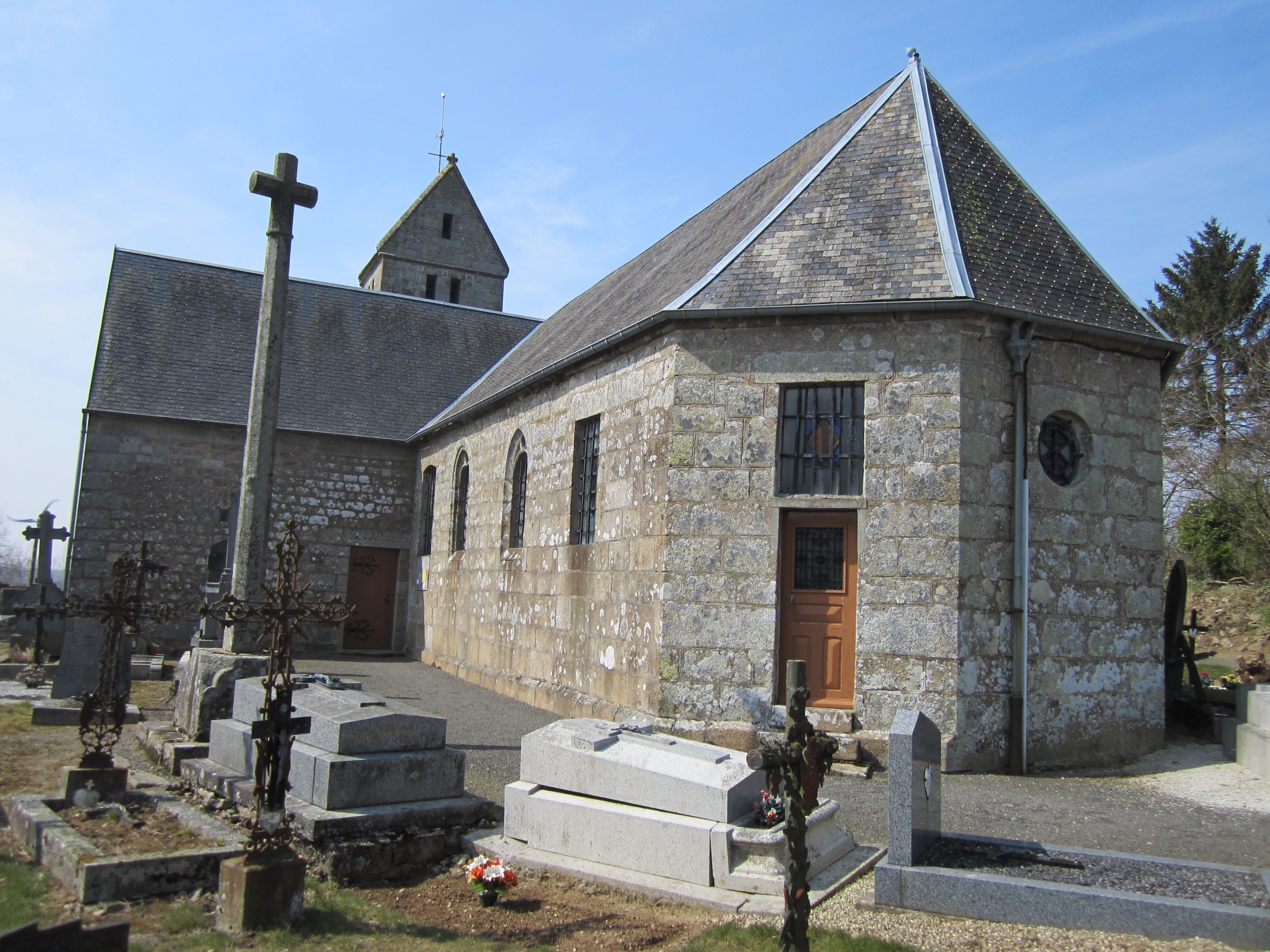 Église Saint-Cyr-et-Sainte-Julitte de la Chapelle-Cécelin